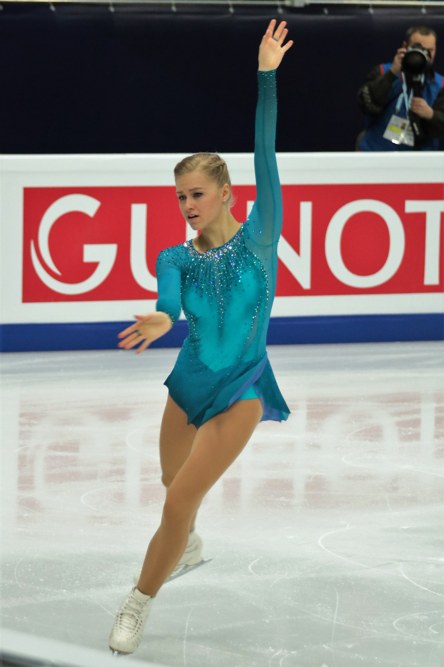 Даша Грм (Словения) на Чемпионате Европы по фигурному катанию 2018.